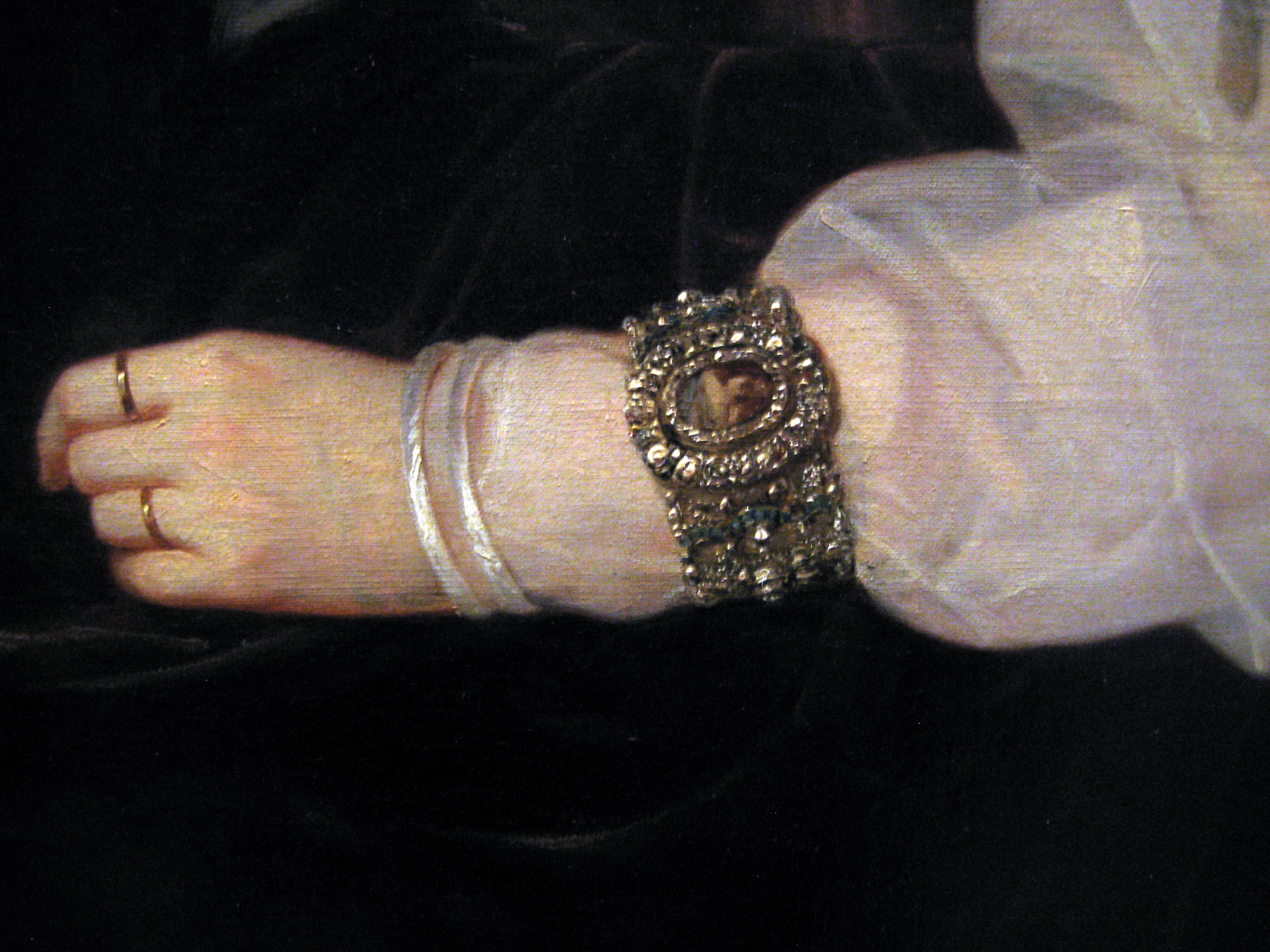 Княгиня Татьяна Васильевна Голицына, урожденной Васильчикова (1781- 1841), жена Д.В.Голицына.